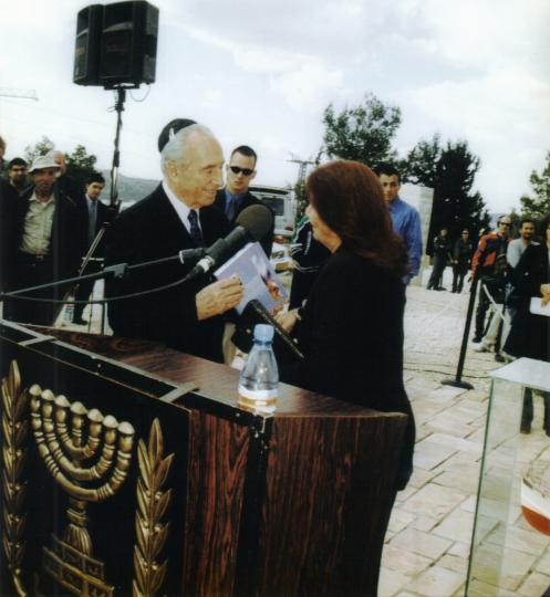 אסתר מעניקה את הספר "הר הבית זועק לשמים" לנשיא המדינה, שמעון פרס, באזכרה לספינת "אגוז" (בתקופה שכיהן כשר)